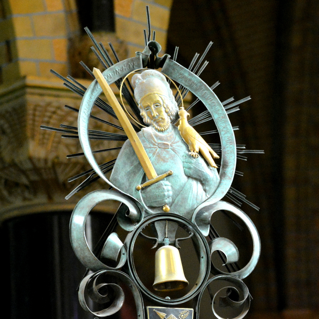 Haarlim, Sint-Bavokatedraal, ynterieur, Sint-Bavo